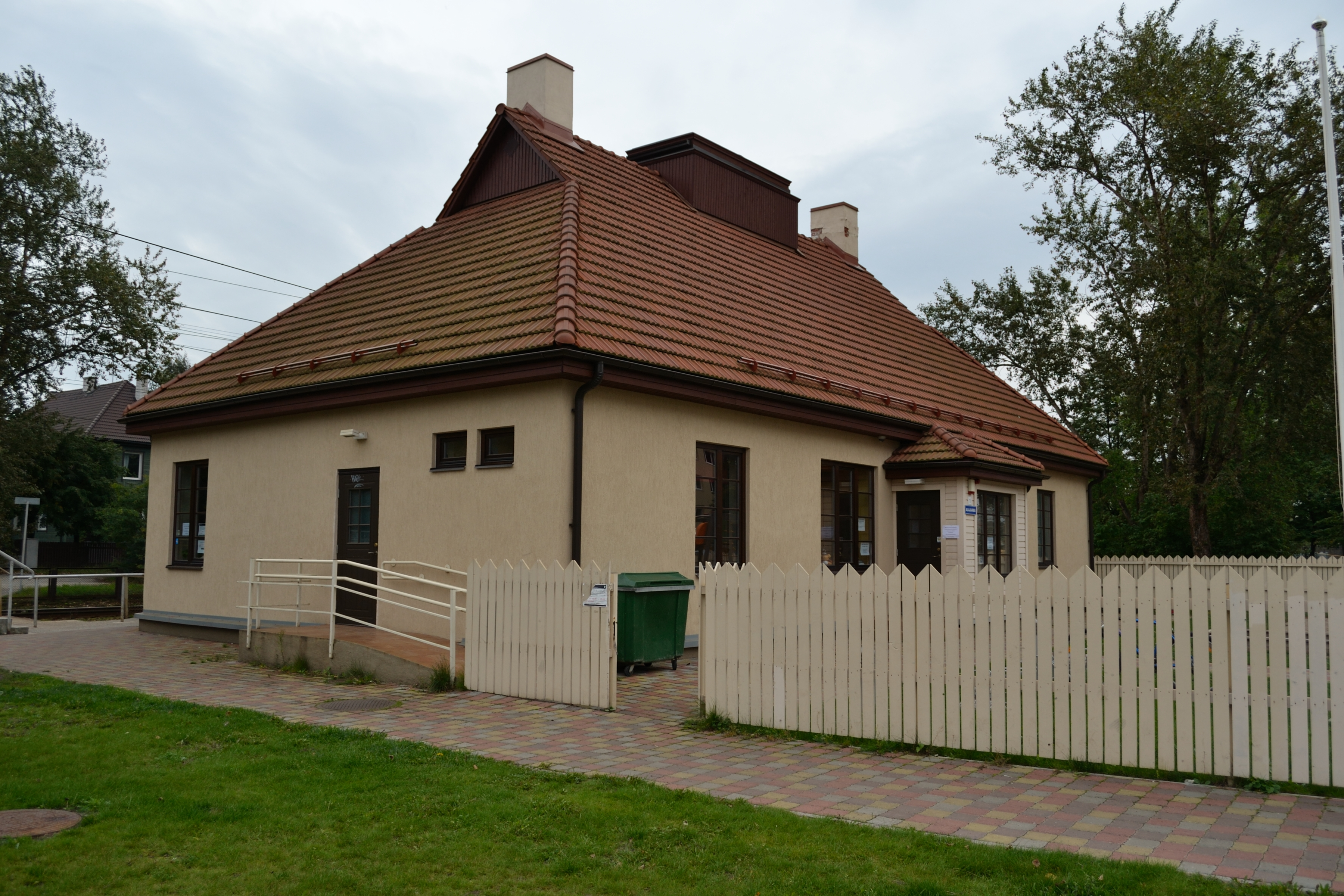 Järve laiarööpmelise raudtee jaamahoone, 1926